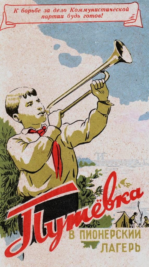 Обложка путёвки в пионерский лагерь, 1961 год, Сызранский район Самарской области, район села Трубетчино.